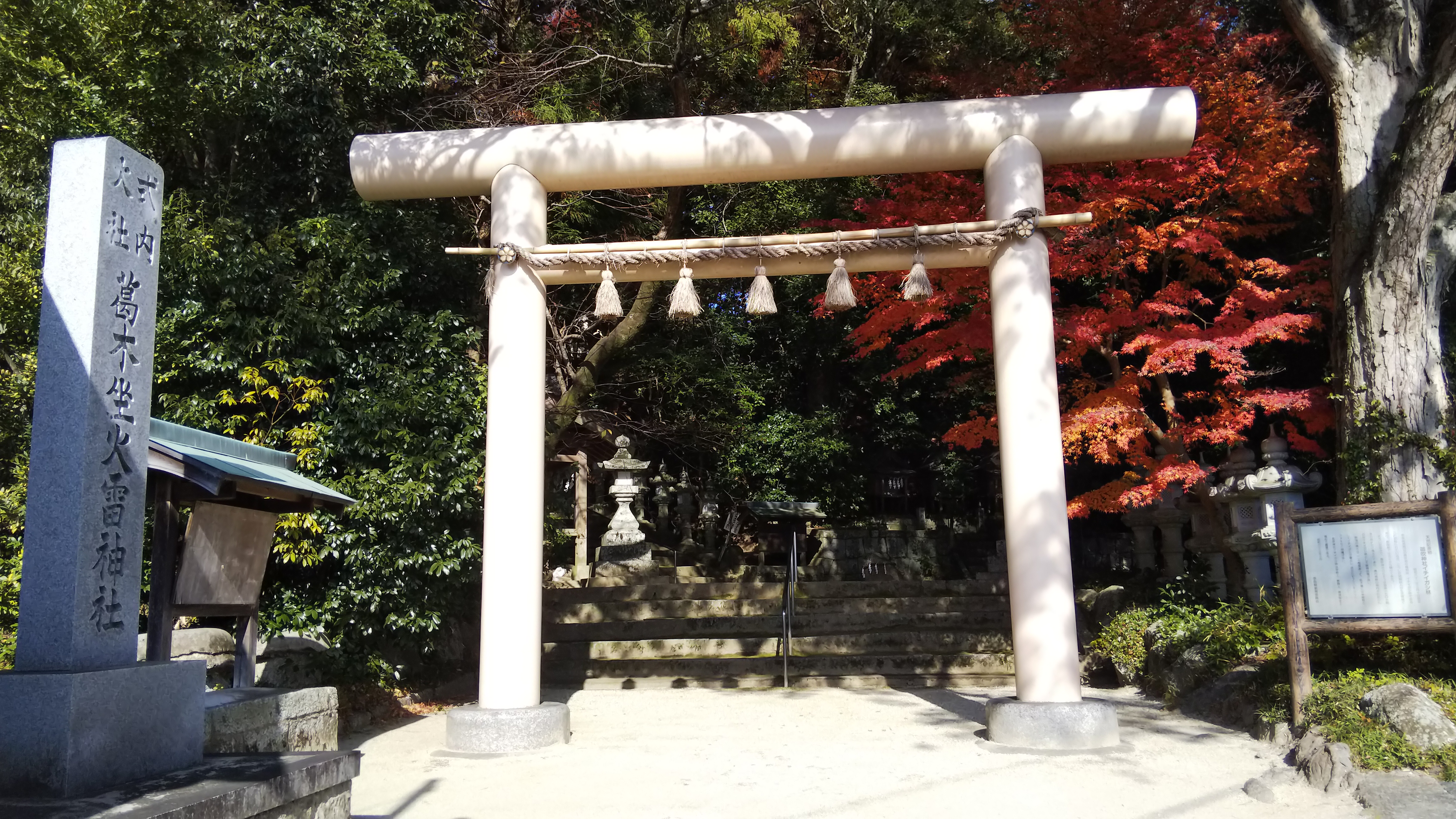 葛木坐火雷神社鳥居